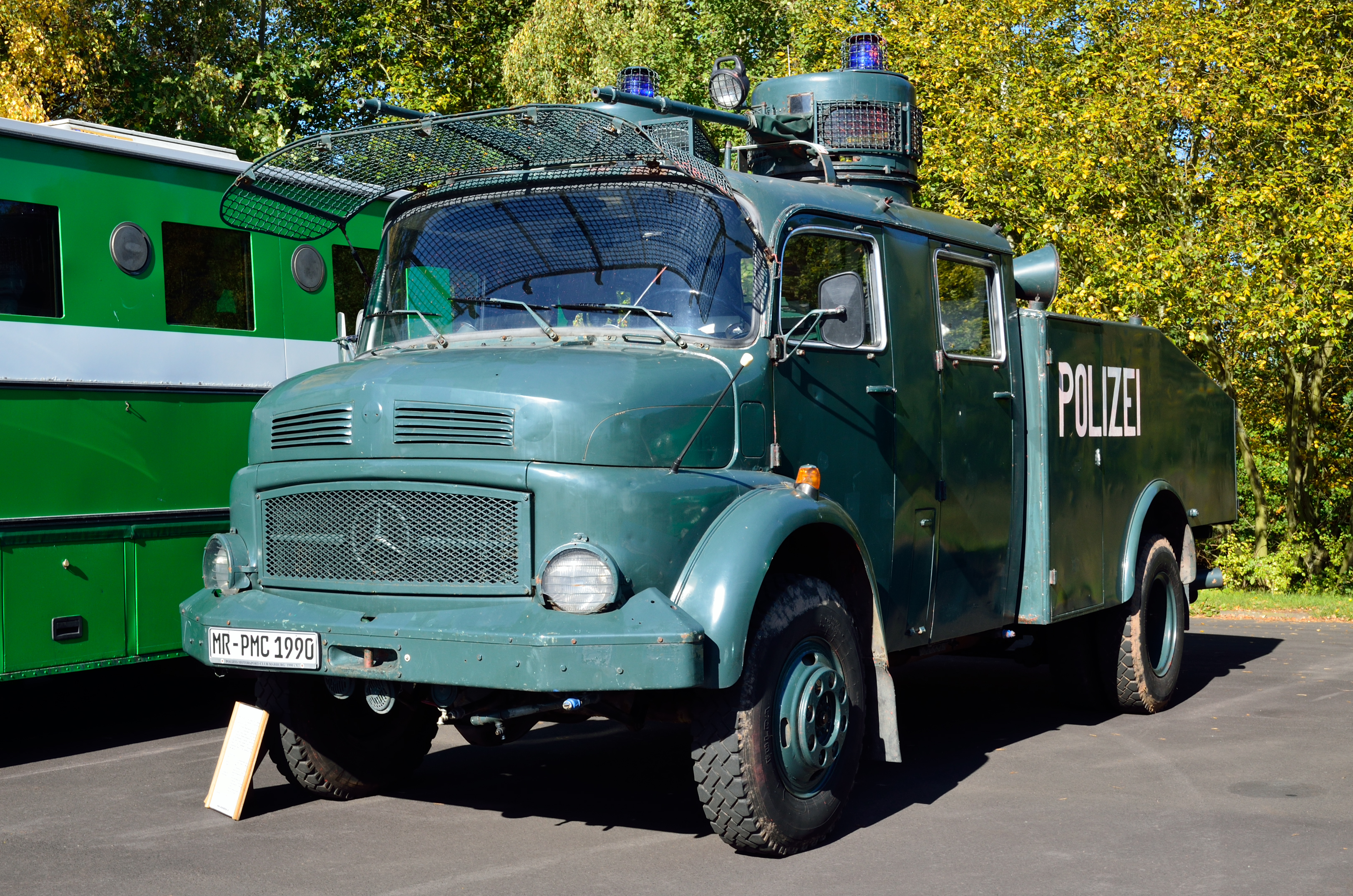 Ein Wasserwerfer (Typ WaWe 4000) im 1. Deutschen Polizeioldtimer-Museum in Marburg